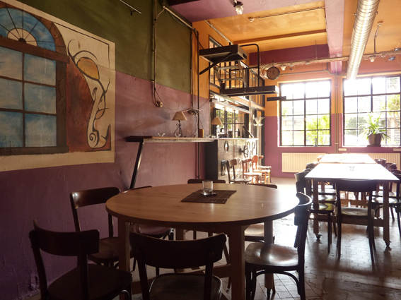 Le Ratelach pour soirées littéraires ou petites formes.